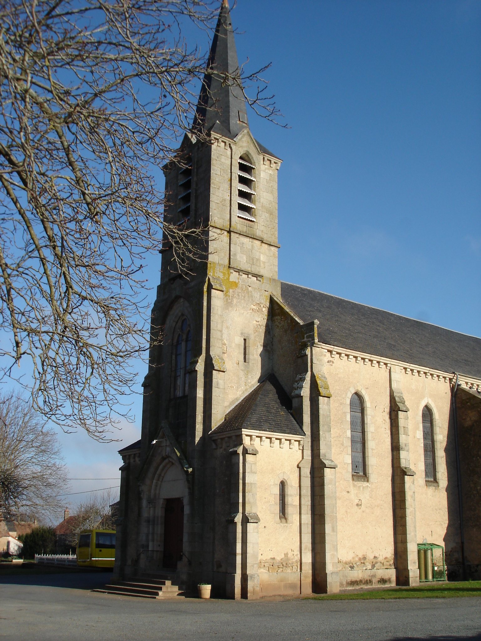 Urciers (36) : L'église.